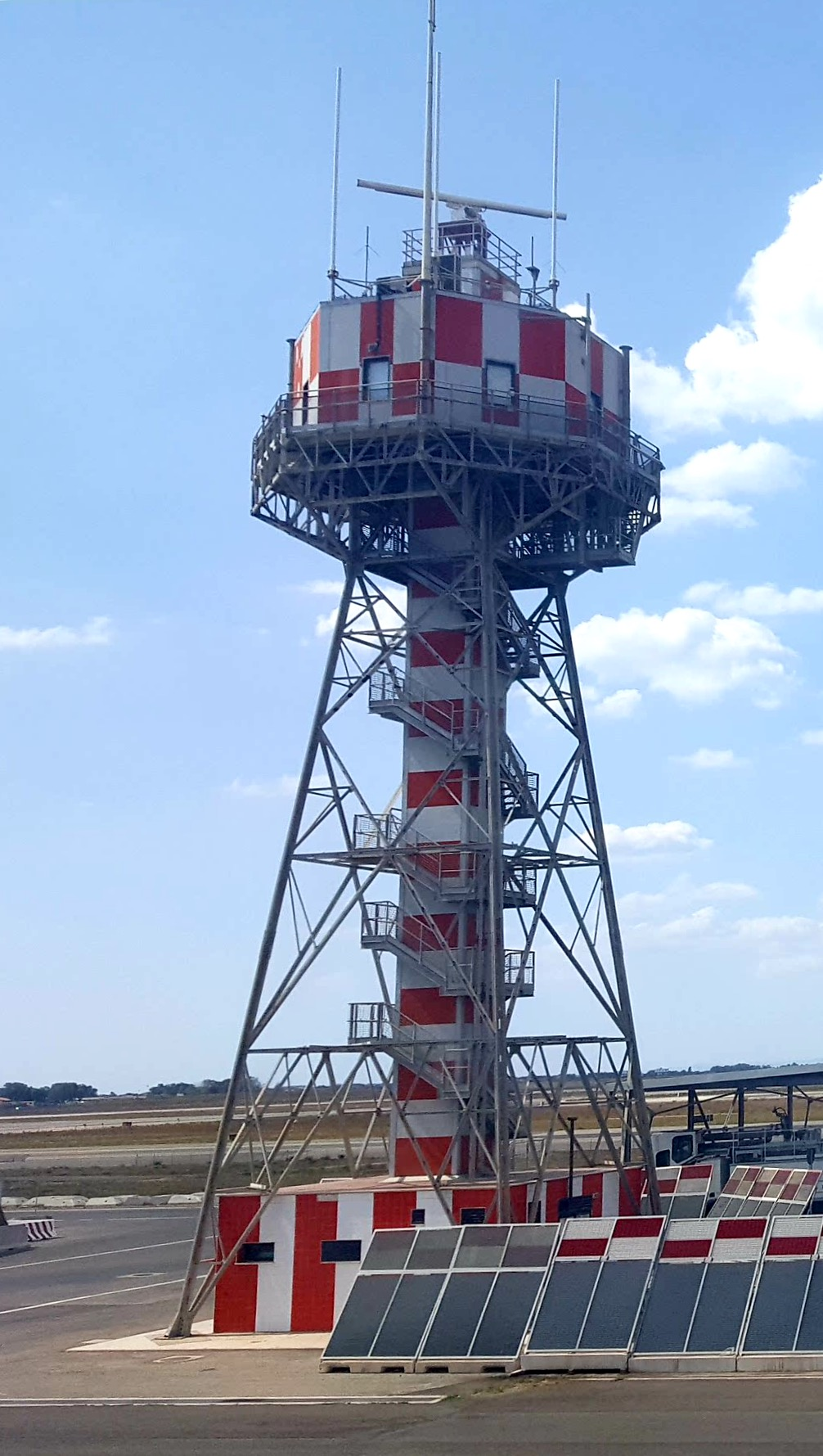 Radar di terra dell'Aeroporto di Roma-Fiumicino. Impianto ENAV, manutenzione Techno Sky.